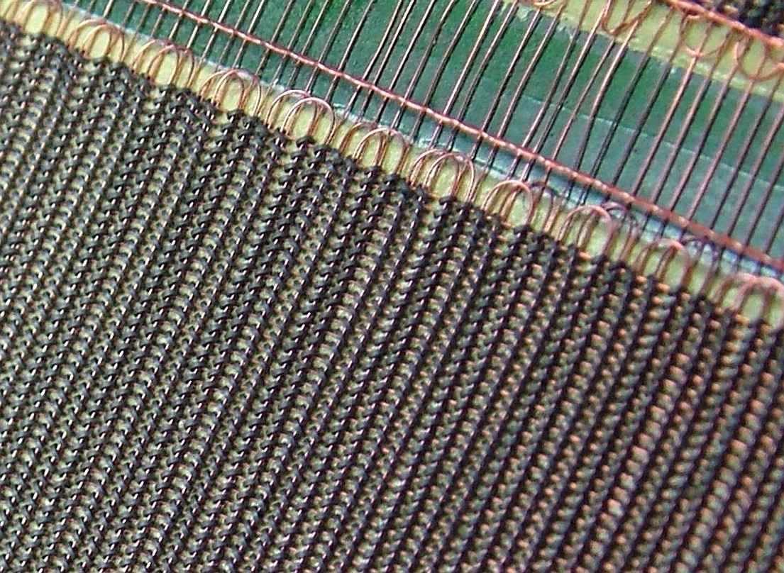 Miniaturowe rdzenie pamięci ferrytowej (średnica ok 0,8 mm) Autor: Stanisław Kosiedowski.